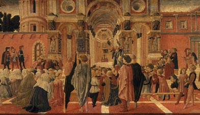 Predica di san bernardinolabel QS:Lit,"predica di san bernardino"